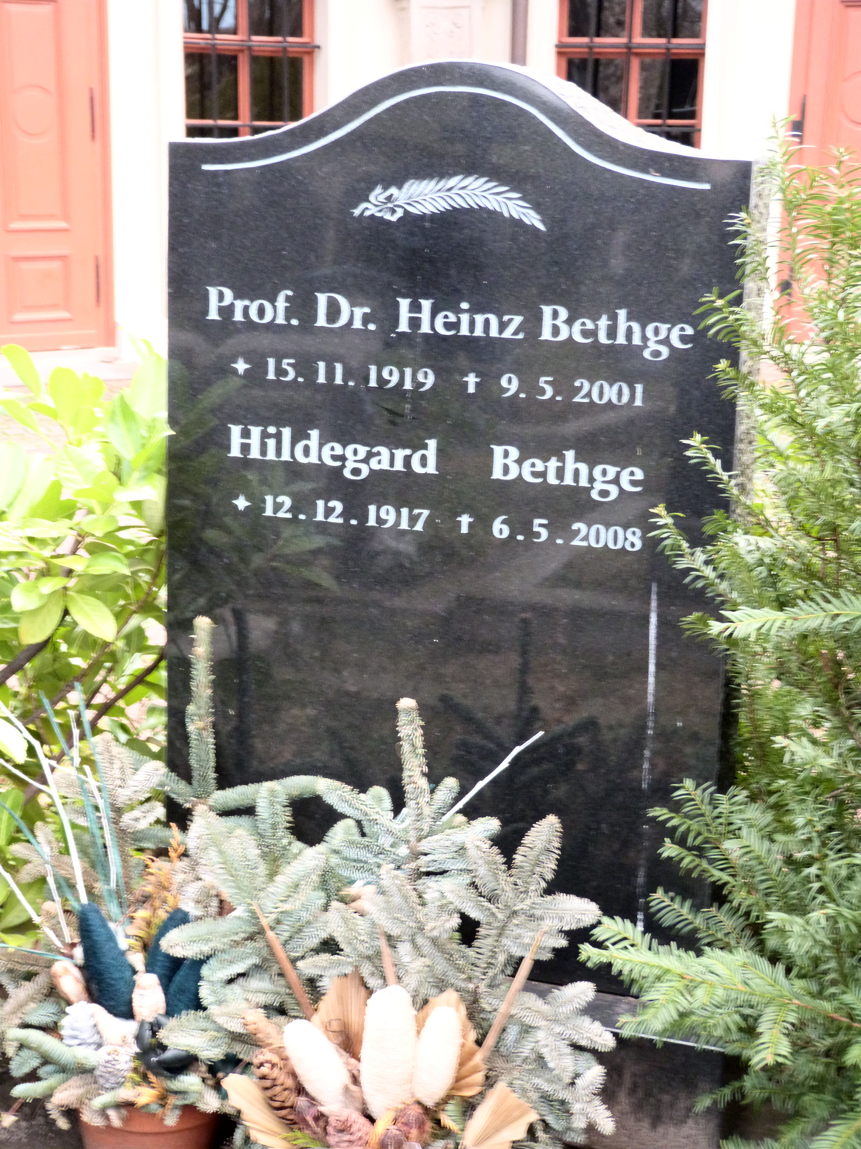 Grab von Prof Dr. Heinz Bethge, Stadtgottesacker Halle, Innenfeld Abt. IV